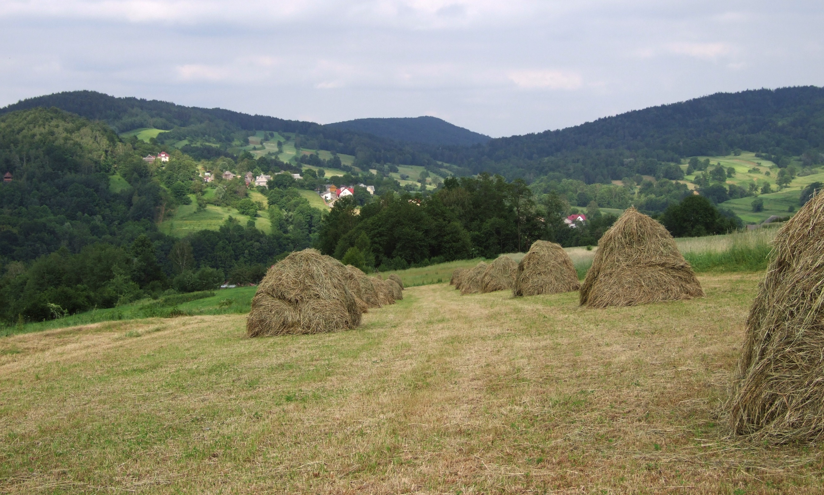 Od lewej: Dominiczna Góra Piekarska Góra i Rogozowa. Widok ze stoków Paprotnej